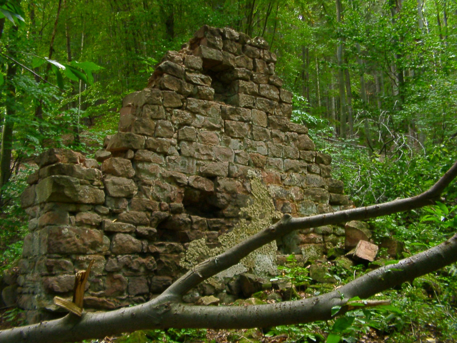 Hofruine Weilach